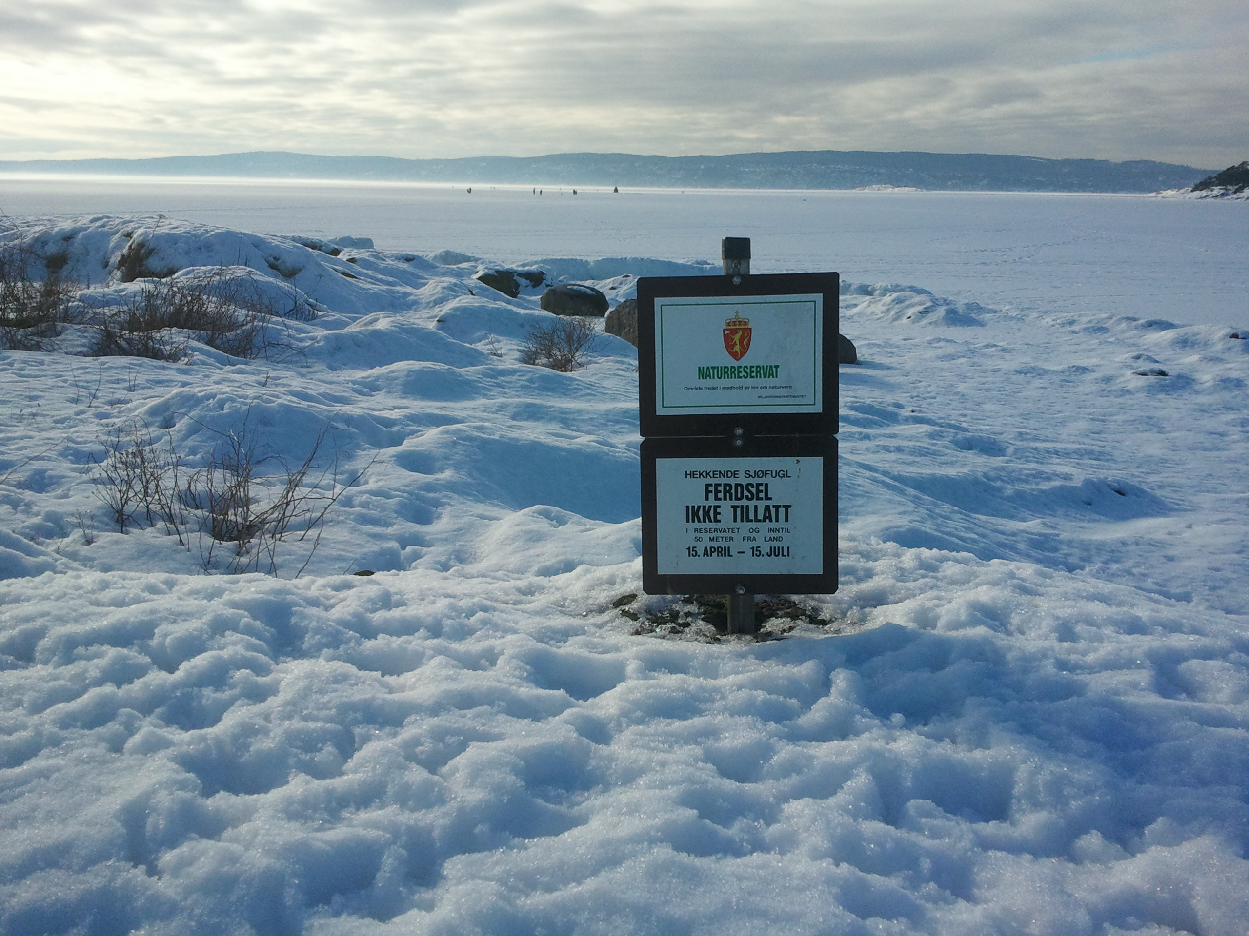 Malmøyskjær fotografert mot Nesodden, februar 2013